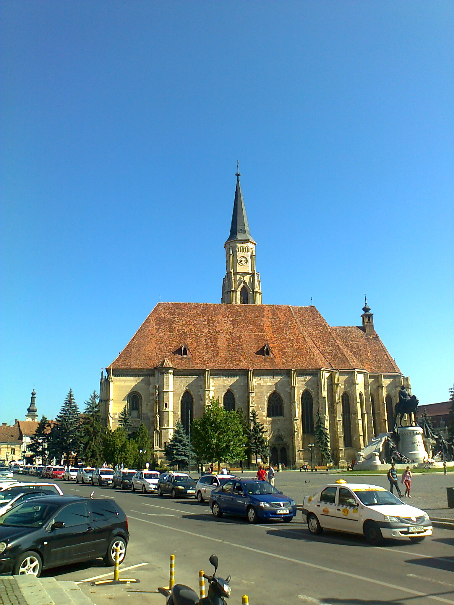 Biserica romano-catolică "Sf. Mihail"